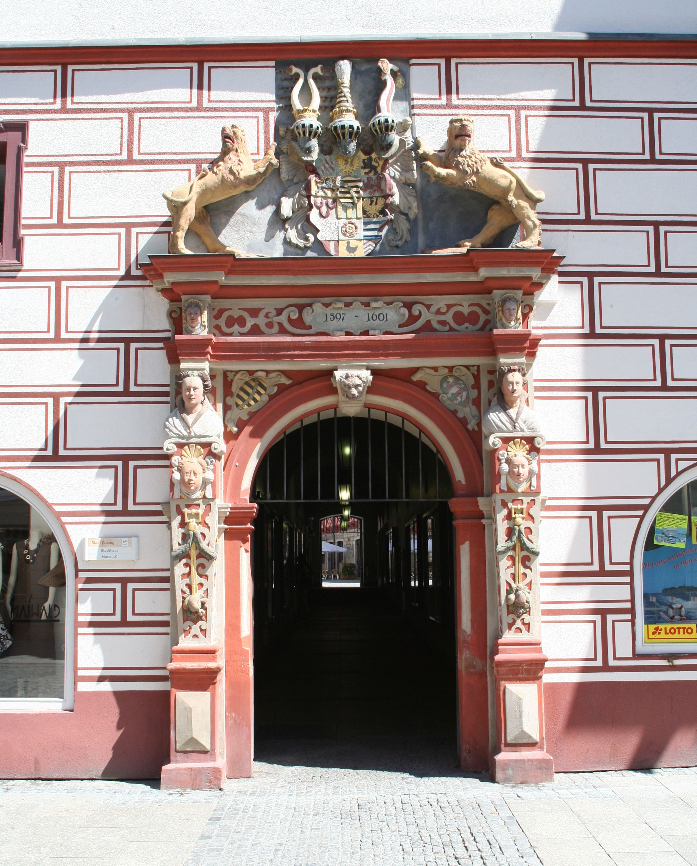 Stadthaus, am Markt 11 in Coburg; westliches Eingangsportal